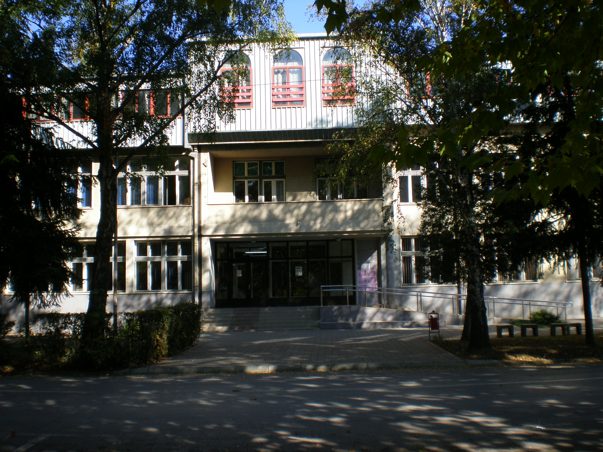 Агрономски факултет је високошколска установа.Налази се у мирном делу града у улици Цара Душана 34, недалеко од центра. У непосредној близини факултета налазе се Студентски дом, Студентски ресторан, Технички факултет, Висока техничка школа, Институт за воћарство, Спортски центар «Младост» са базенима, атлетском стазом и спортским теренима.